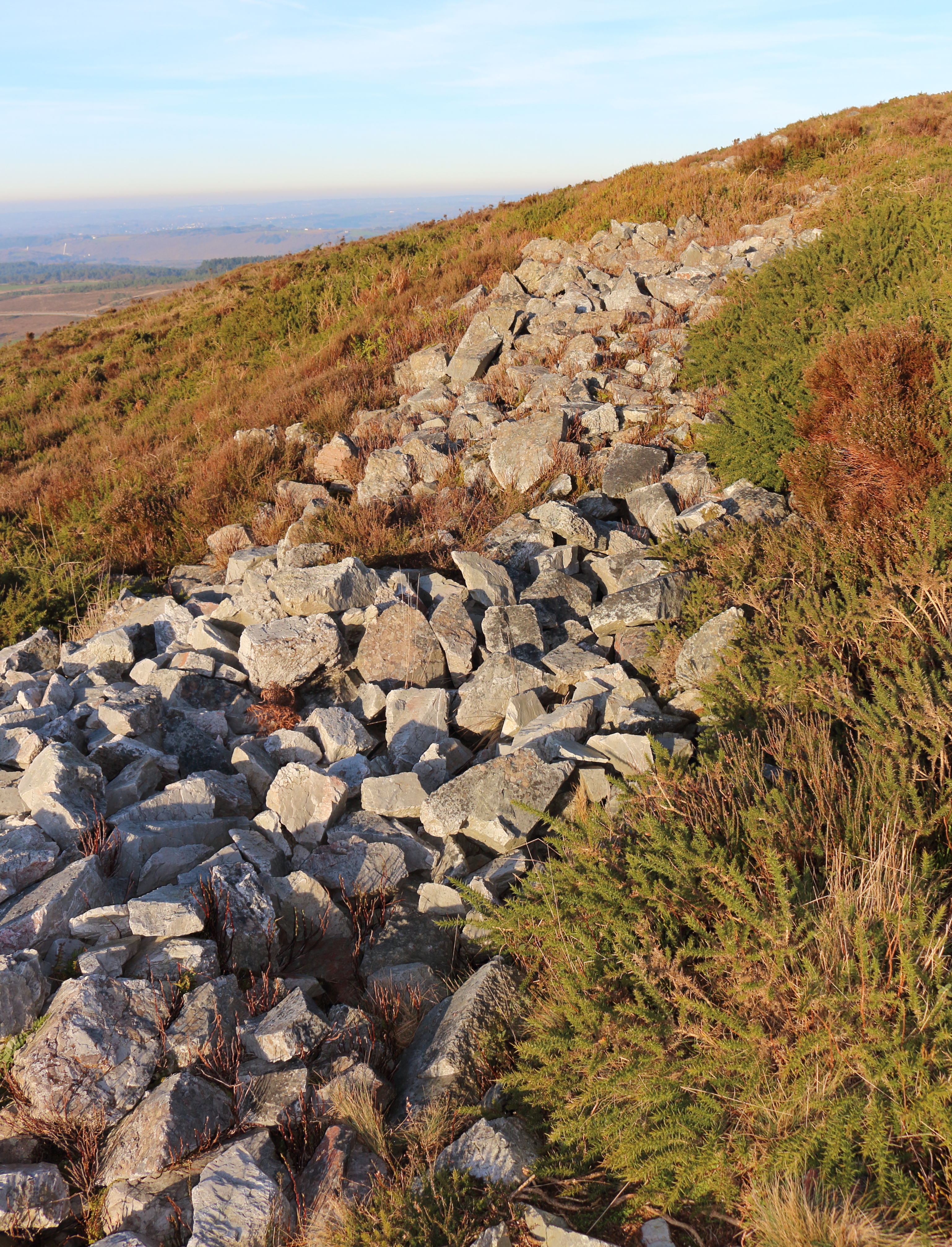 Vue d'une partie de l'enclos circulaire du flanc sud du Yelc'h (Petit Ménez-Hom), commune de Saint-Nic, Finistère, Bretagne, France.